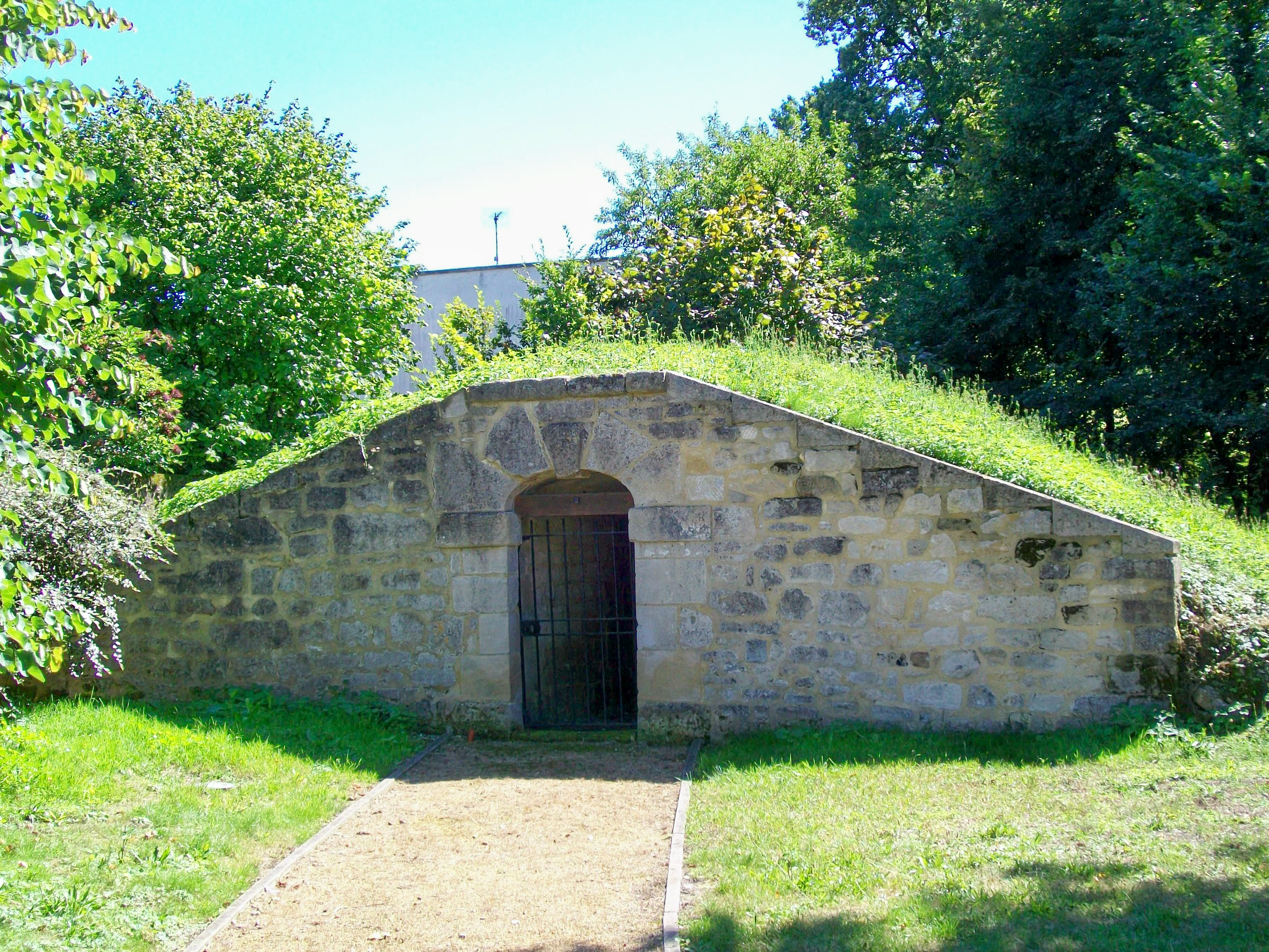 L'autre des deux glacières situées à l'entrée est du village d'Avilly.